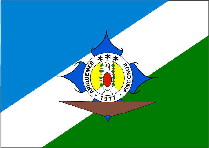 Bandeira do município de Ariquemes, Rondônia, Brasil